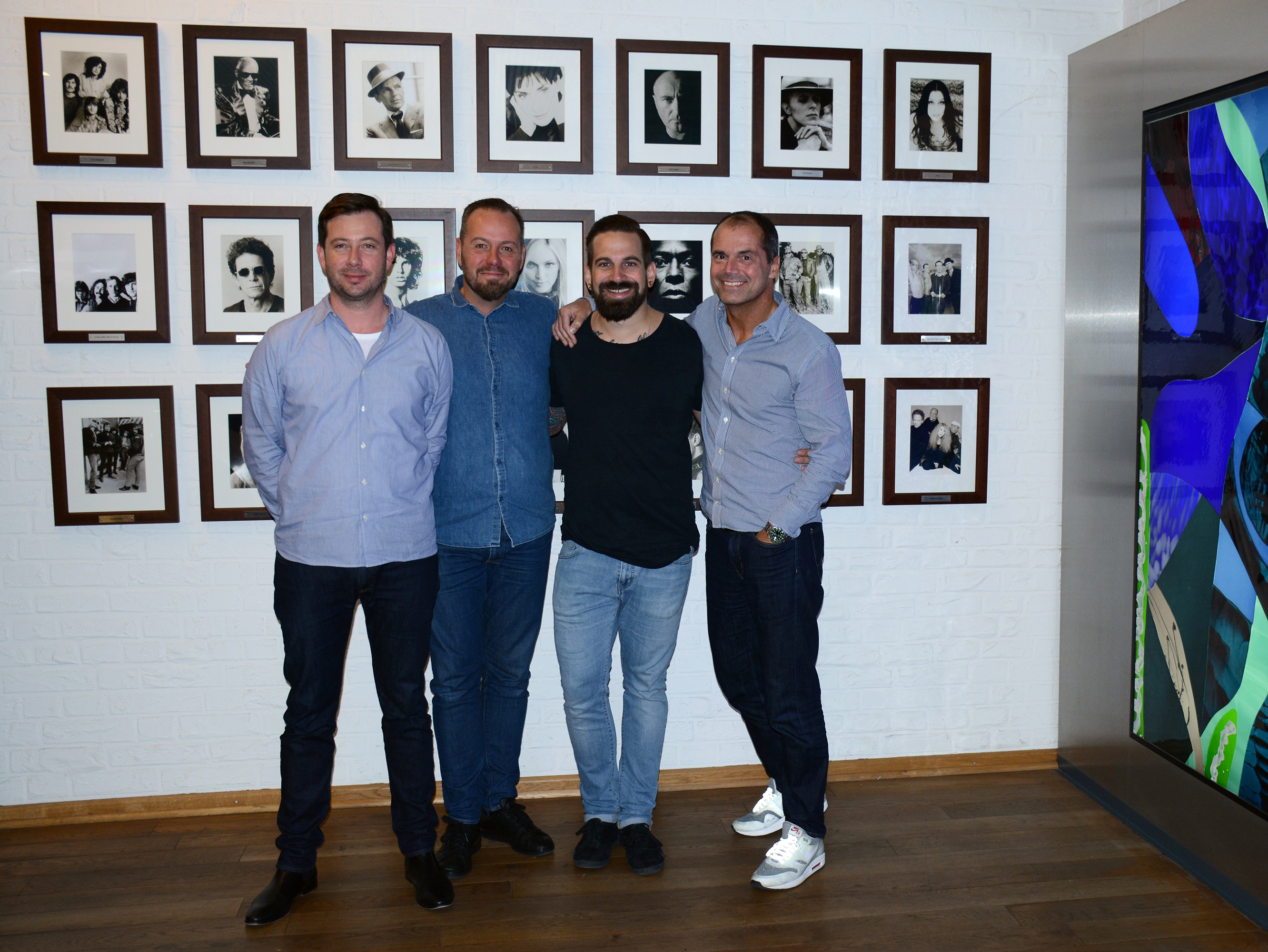 Kooperation zwischen Warner Music und Department Musik: Michael Kümmerle (Director Digital Sales & Business Development Warner Music), Alexander Röhrs (Sales Marketing Manager Warner Music), Jan-Simon Wolff (Geschäftsführer Department Musik) und Marcus Friedheim (Managing Director Sales Central Europe Warner Music)